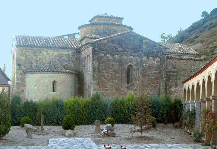 Santa Maria del Priorat, Castellfollit de Riubregós, Catalunya.